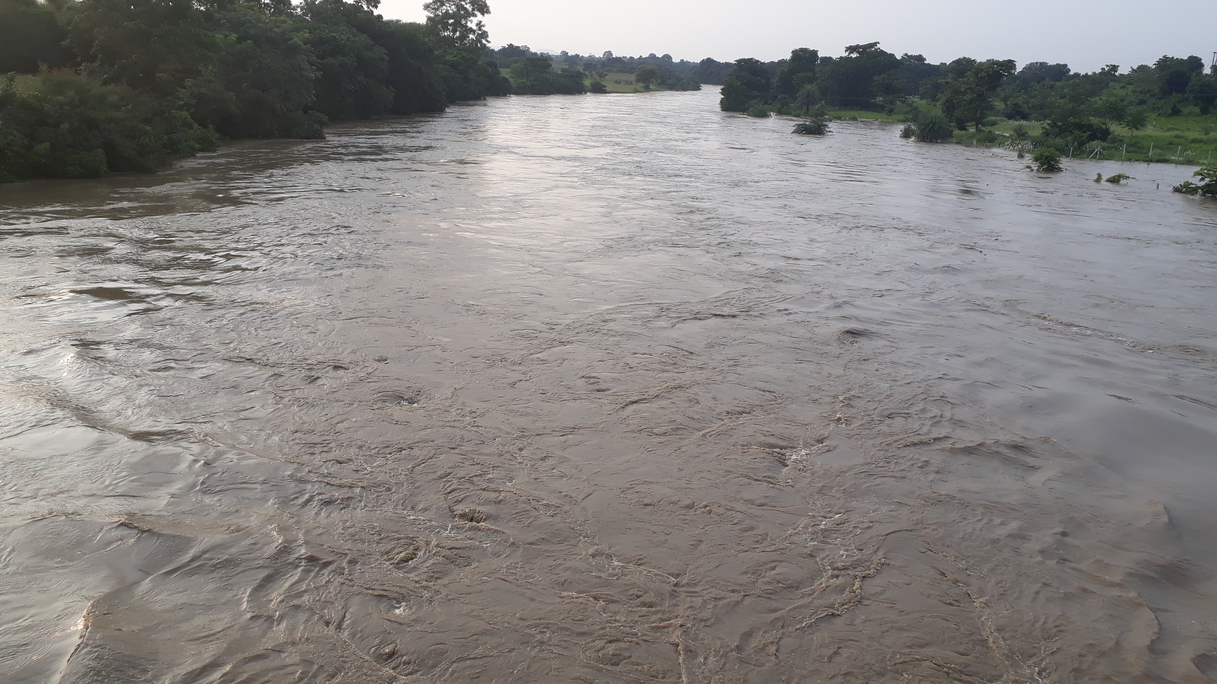 वैनगंगा नदी बंडोल